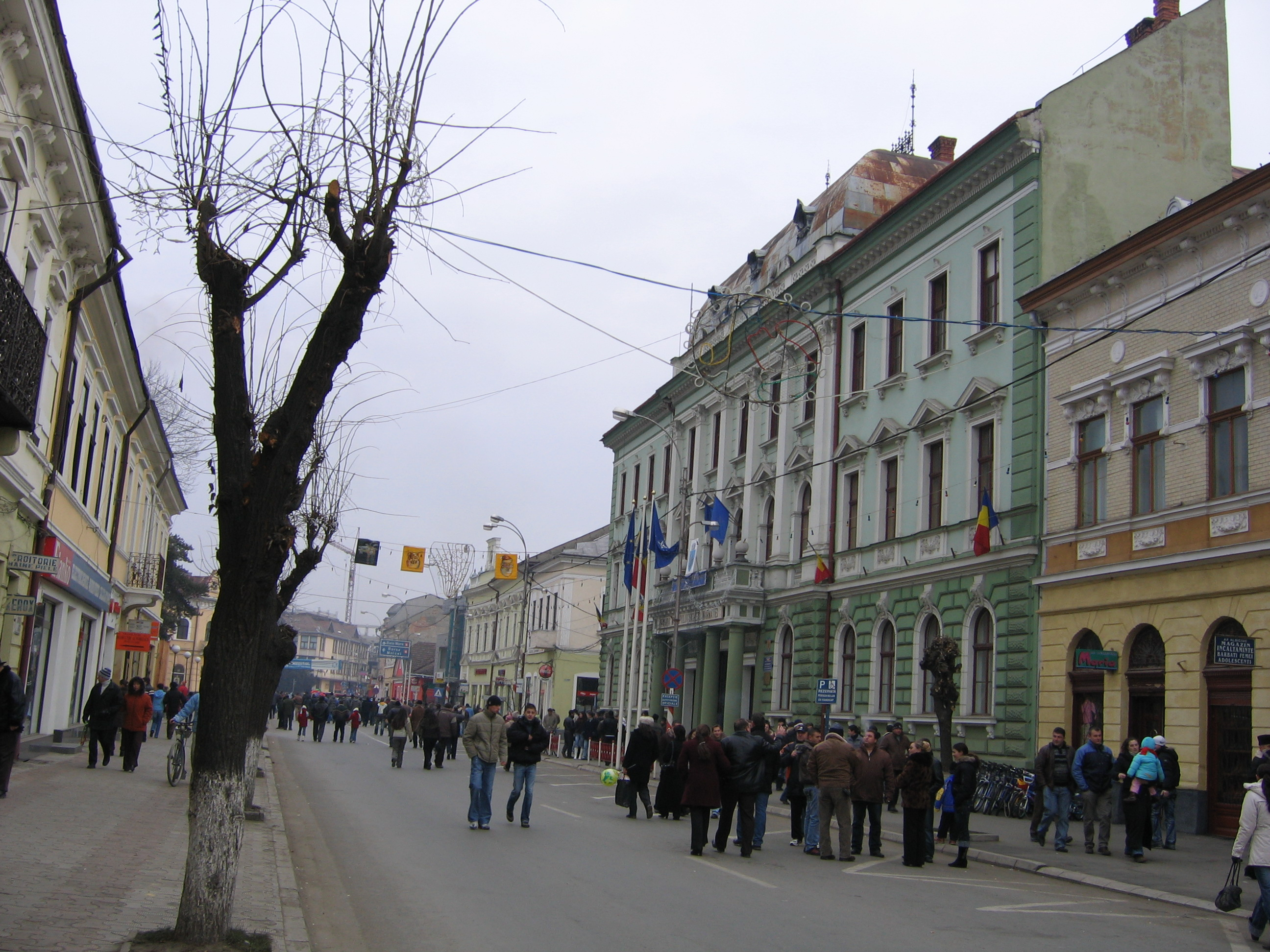 Hauptstraße im Zentrum von Sighet. Rechts das grüne Gebäude mit den Fahnen gehört zur Stadtverwaltung.